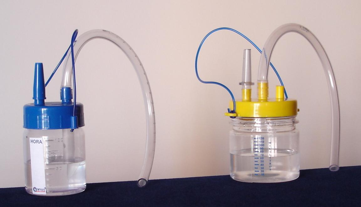 Fotografia do Sistema coletor de secreÃ§Ã£o Ã© um equipamento usado na Medicina destinado Ã coleta de secreÃ§Ã£o corpÃ³rea. Componentes: Frasco coletor (1) transparente, graduado e atÃ³xico; GraduaÃ§Ã£o volumÃ©trica (2); Tampa (3) com vias (torres) para conexÃ£o dos tubos, rosca e anel de vedaÃ§Ã£o interna; AlÃ§a de transporte (4); Tubo de extensÃ£o (5) para conexÃ£o com a sonda de aspiraÃ§Ã£o ou endoscÃ³pio; Conector cÃ´nico (6) para conexÃ£o com o tubo de aspiraÃ§Ã£o do vÃ¡cuo hospitalar; Tubo interno (7); Etiqueta de identificaÃ§Ã£o (8)